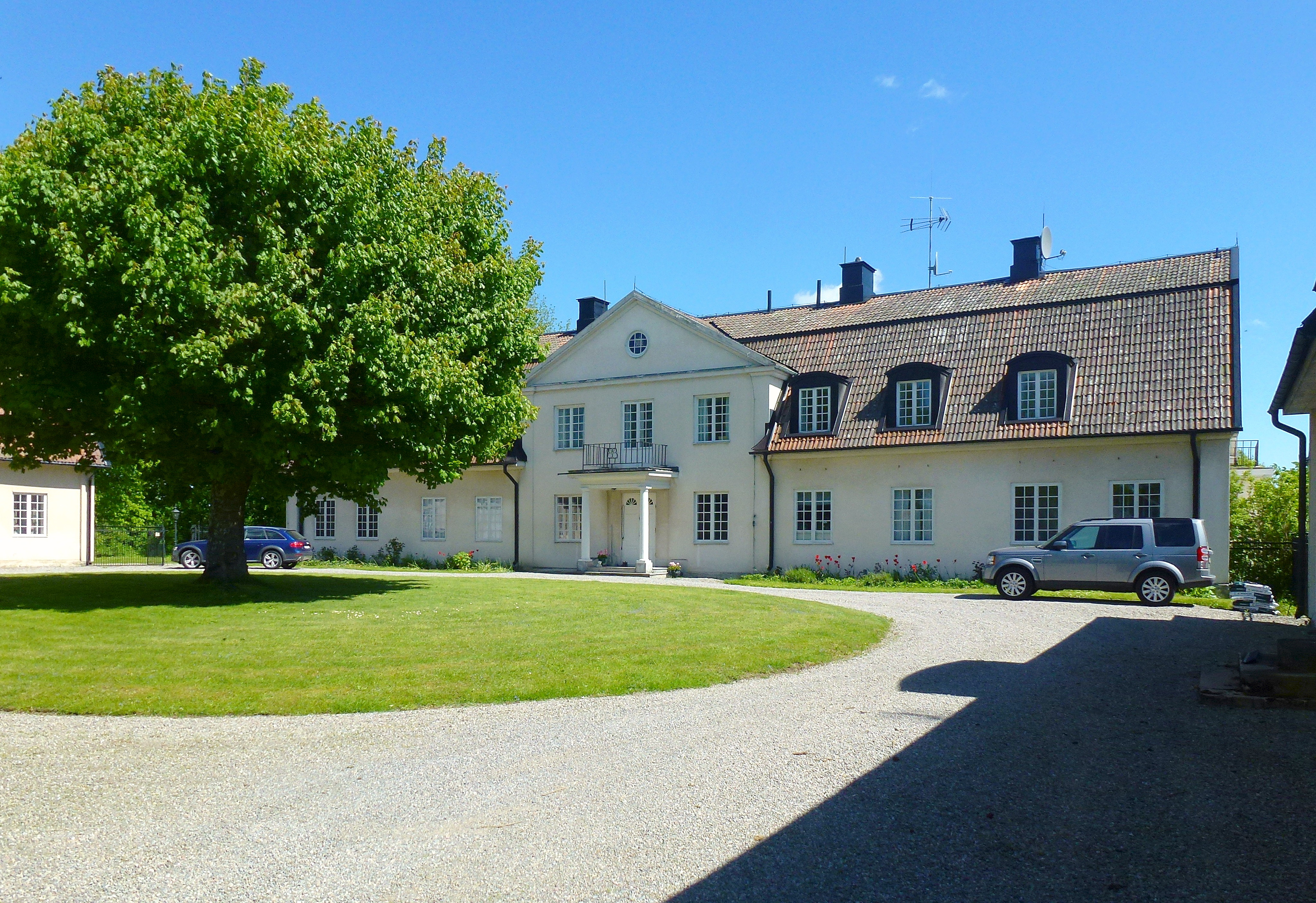 Körunda gård